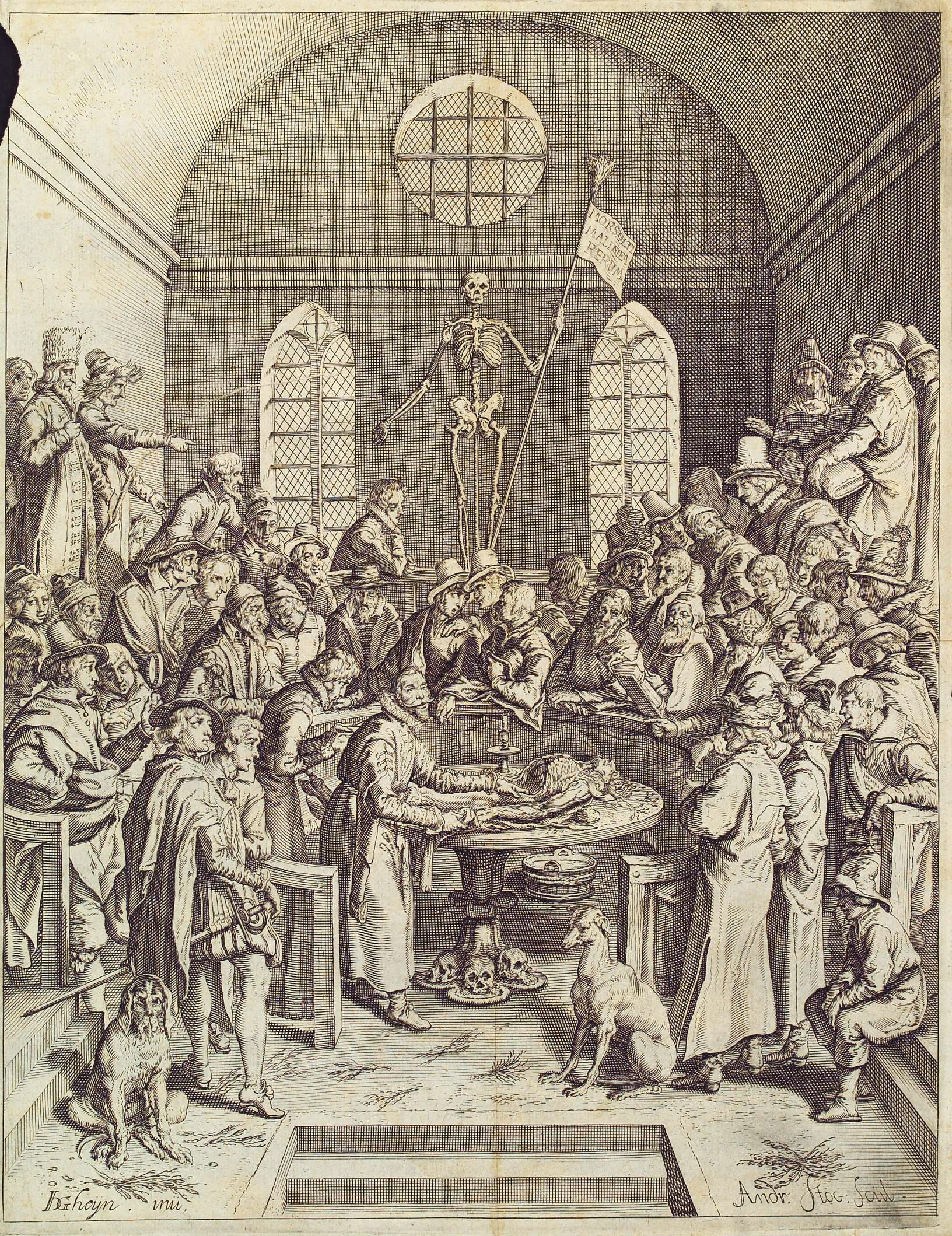 Die anatomische Vorlesung. Wolfenbüttel, Herzog August Bibliothek, Inv.-Nr. Graph. A1: 2638a